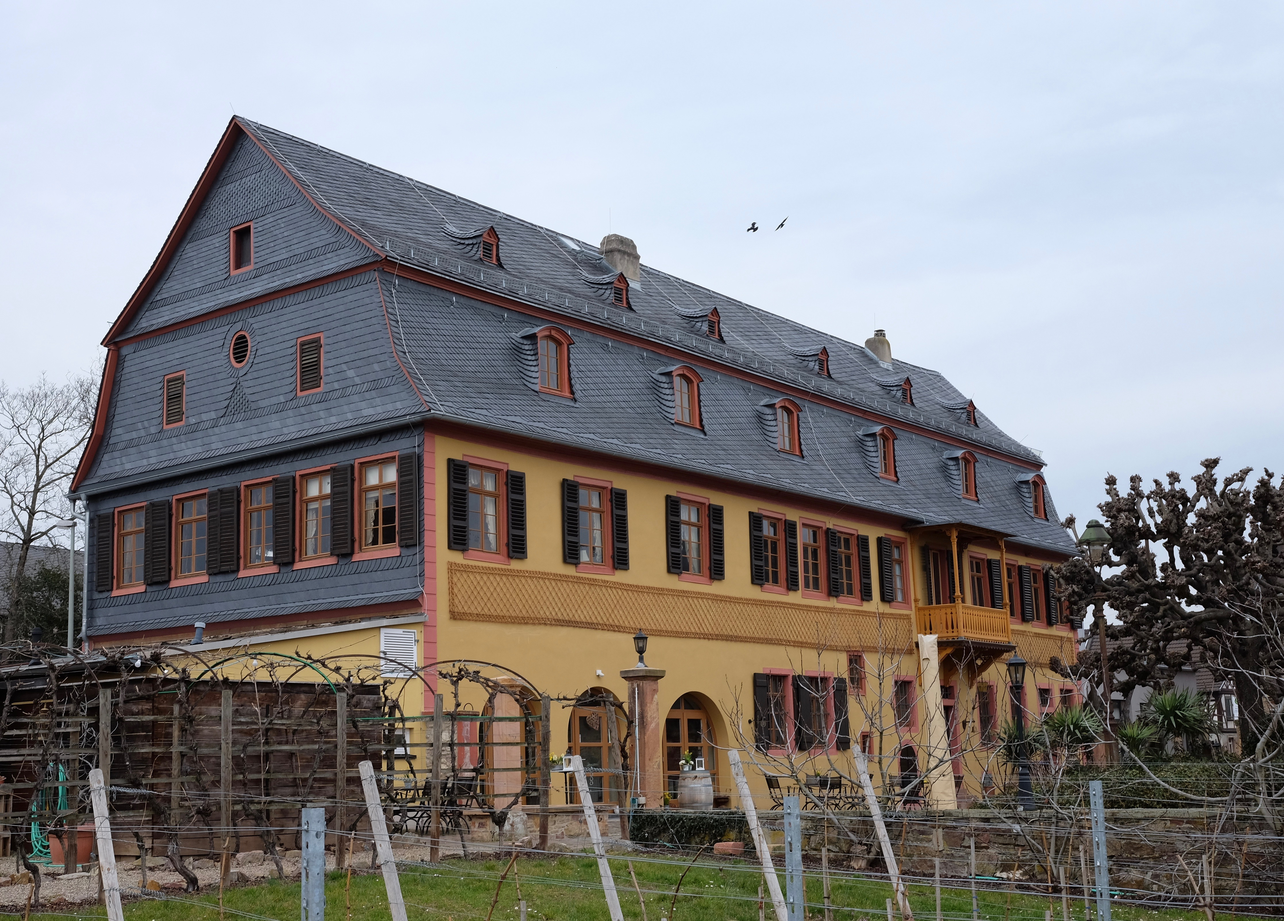 Aussenfassade des Brentanohause nach Aussenhüllensanierung im Frühjahr 2018